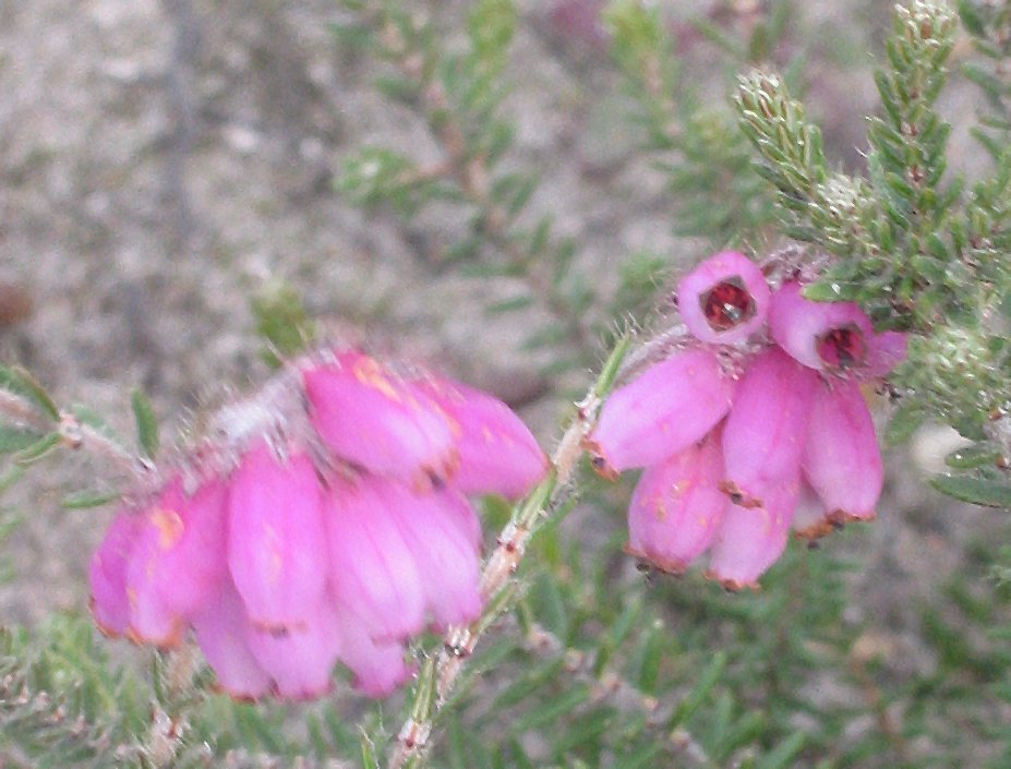 Gewone dophei bloemen; half september.